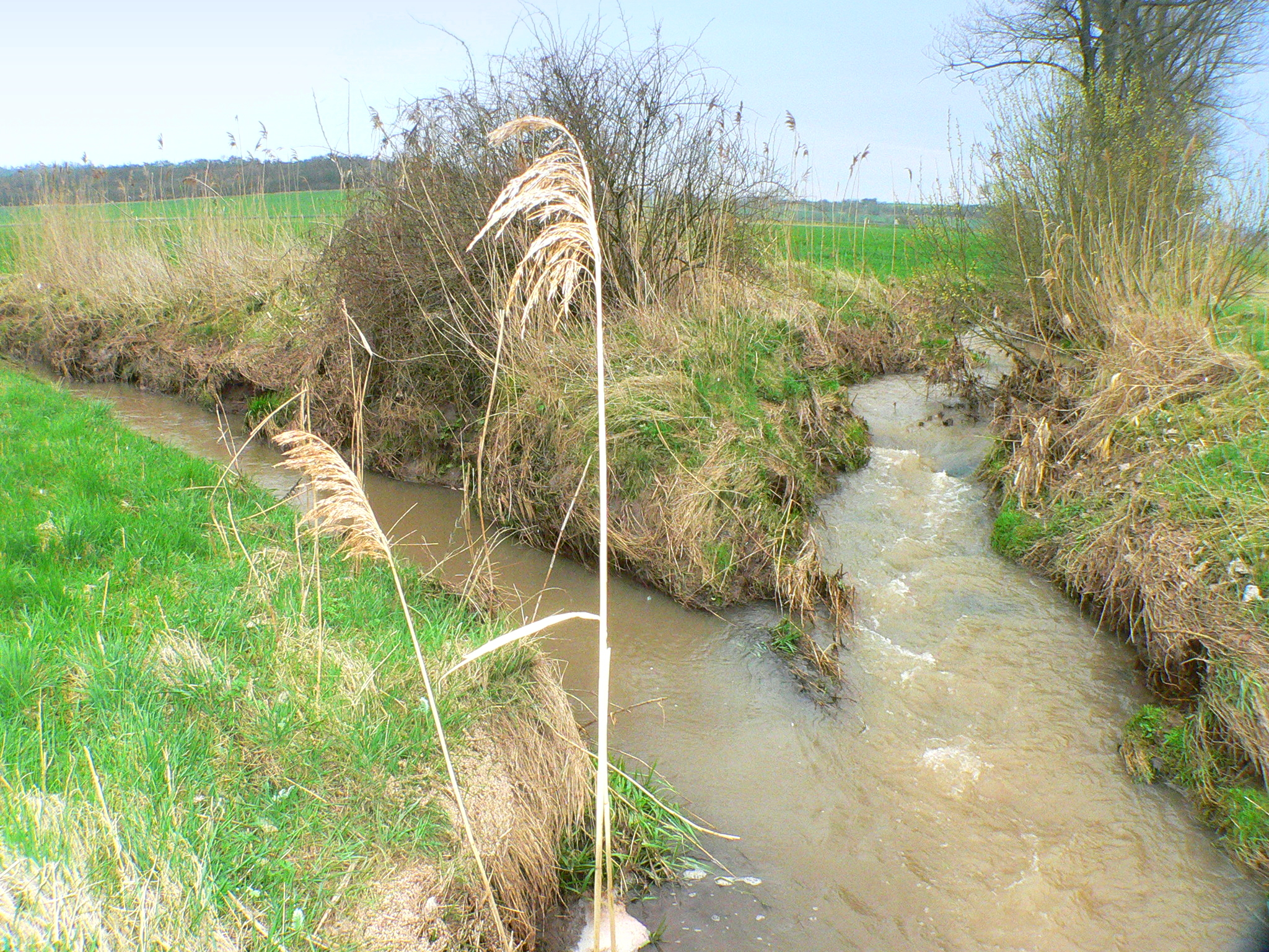 Zusammenfluss beider Saalequellflüsse bei Untereßfeld